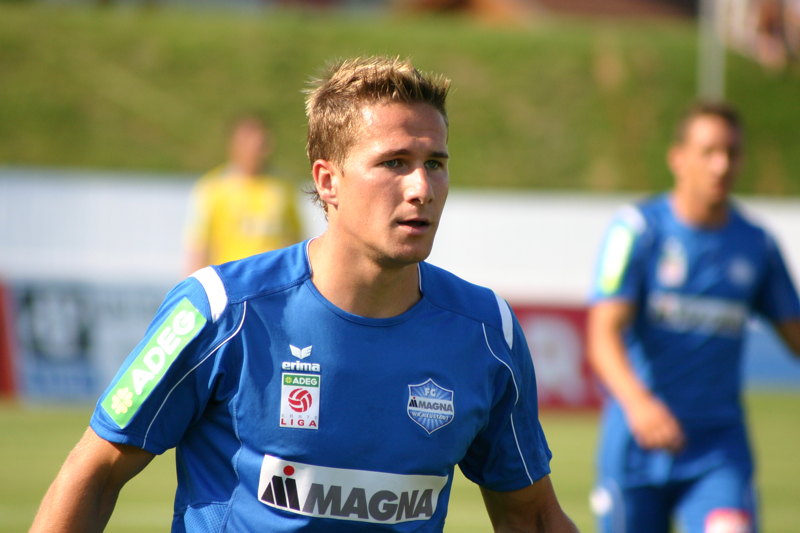 Daniel Dunst, FC Magna Wiener Neustadt